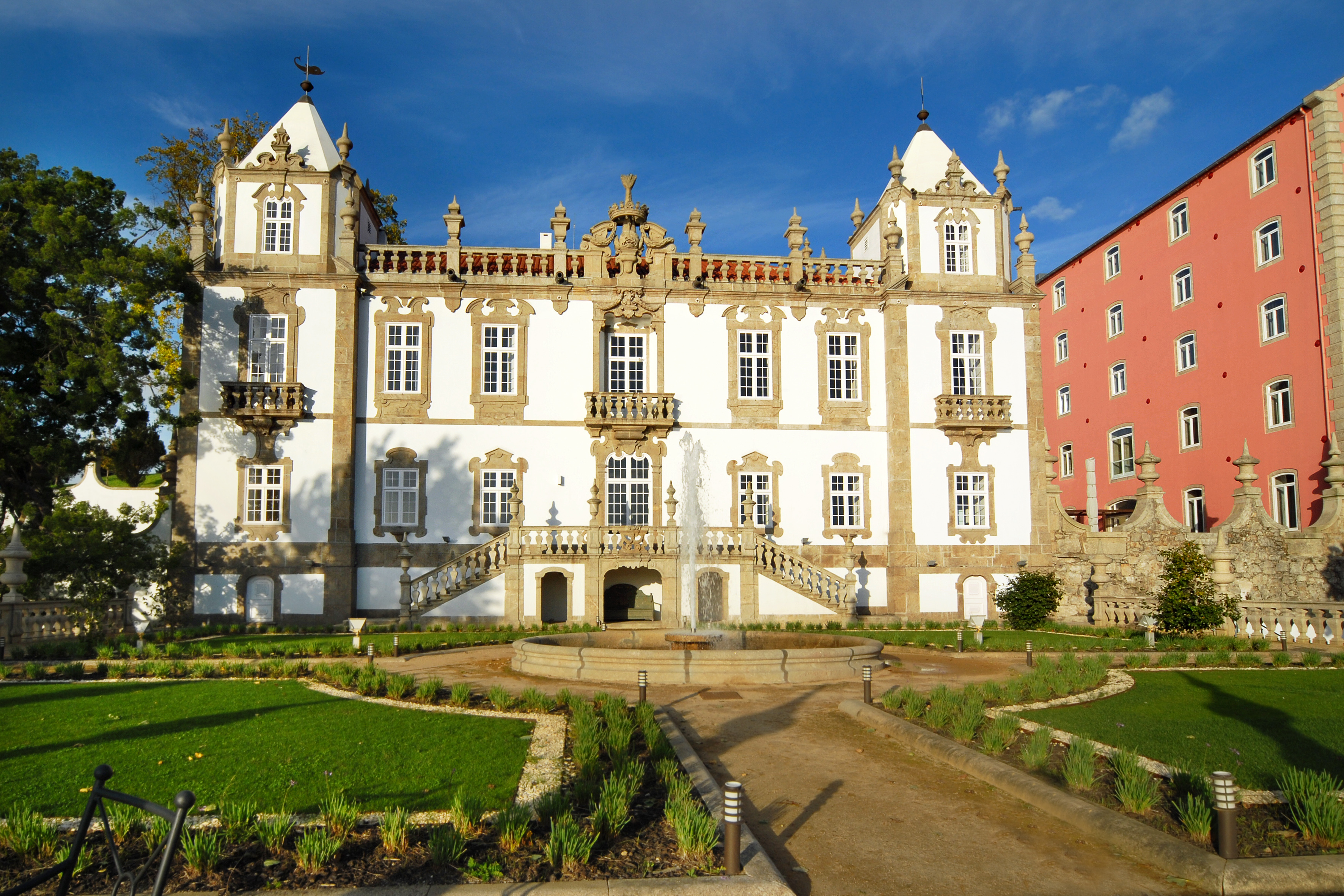 Palácio do Freixo - Fachada virada ao rio